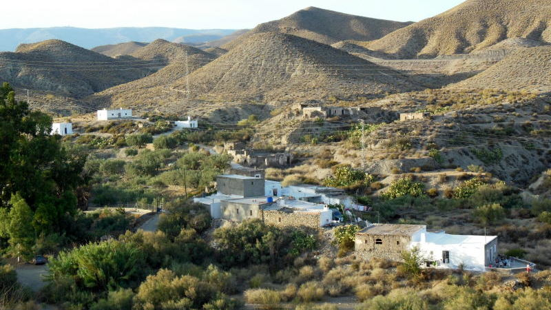 Vista aérea de la parte norte de Fuente Santa (Almería)